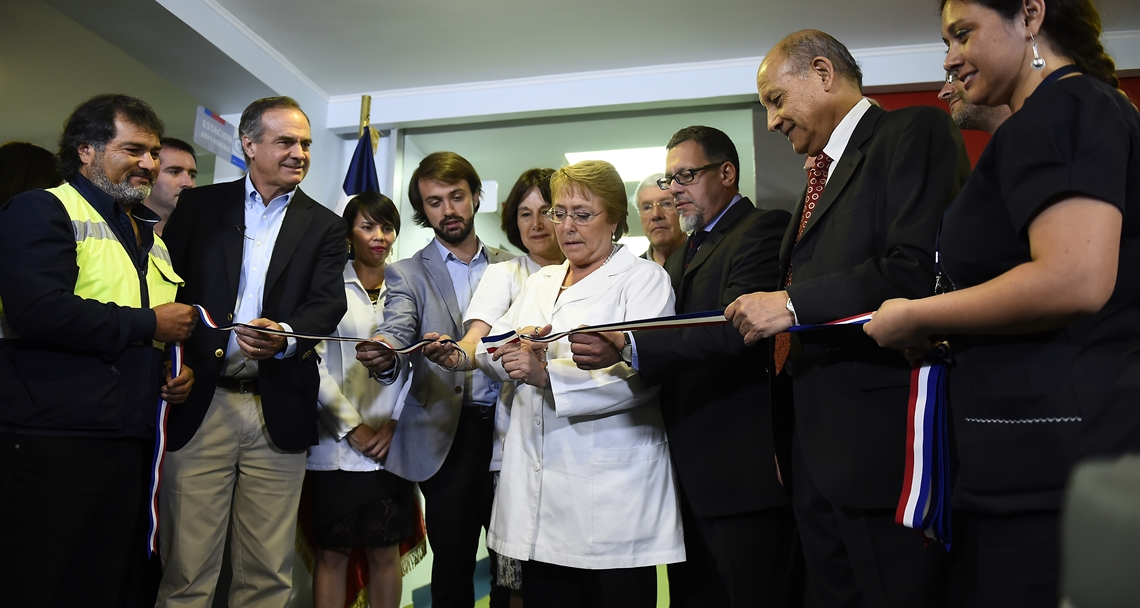 Presidenta Michelle Bachelet y oterras autoridades inauguran el primer SAPU de Alta Resolutividad de la Región de Valparaíso.